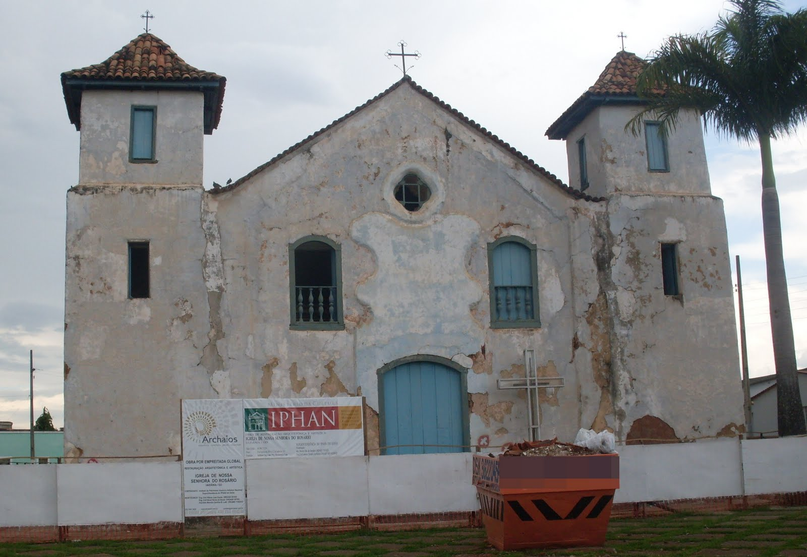 Igreja do rosário em Luziânia GO durante a reforma